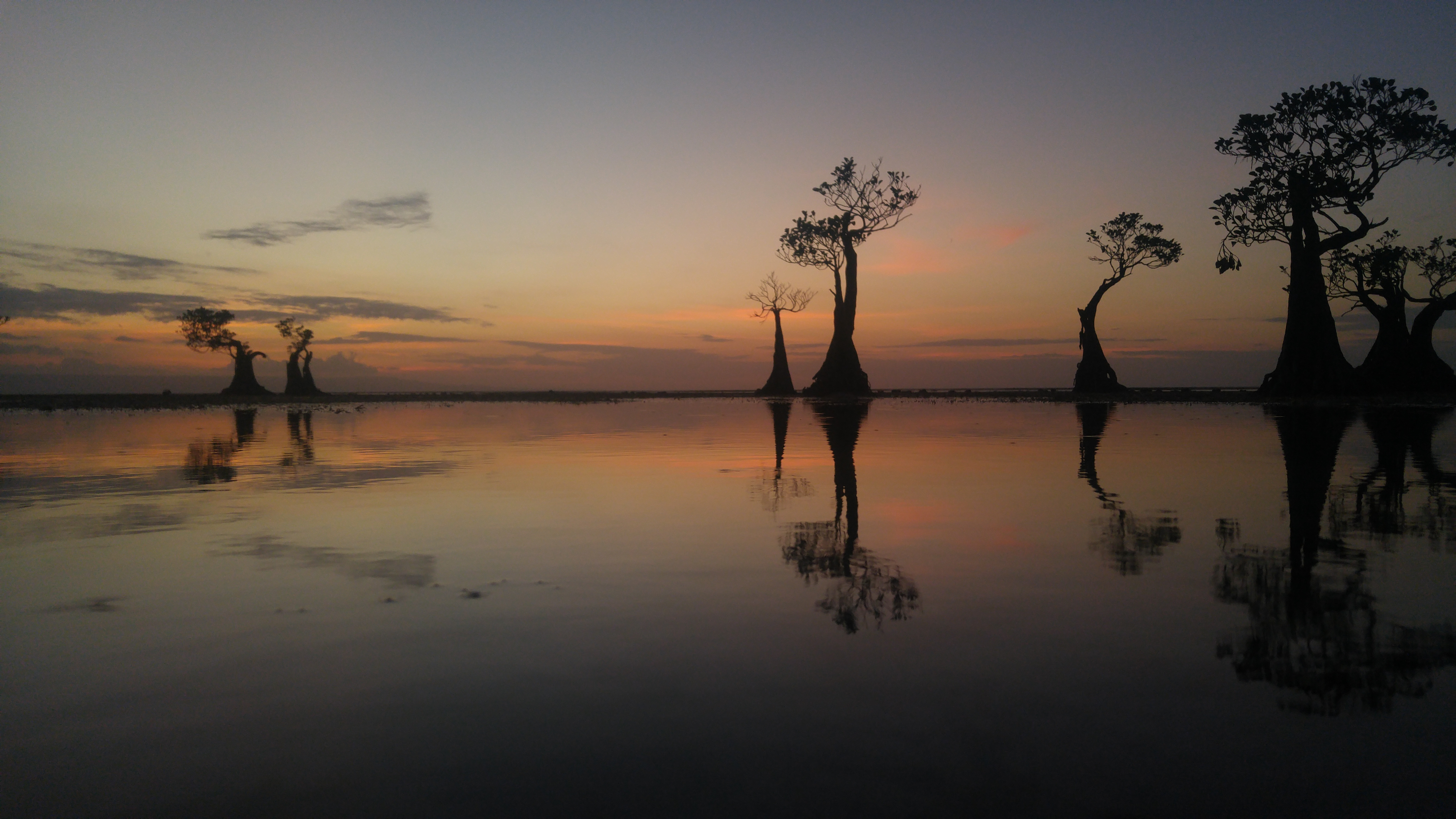 Pantai Walakiri terletak di Desa Watumbaka, Kecamatan Pandawai, Kabupaten Sumba Timur, Nusa Tenggara Timur. Berjarak sekitar 40KM sebelah Timur Laut Kota Waingapu.